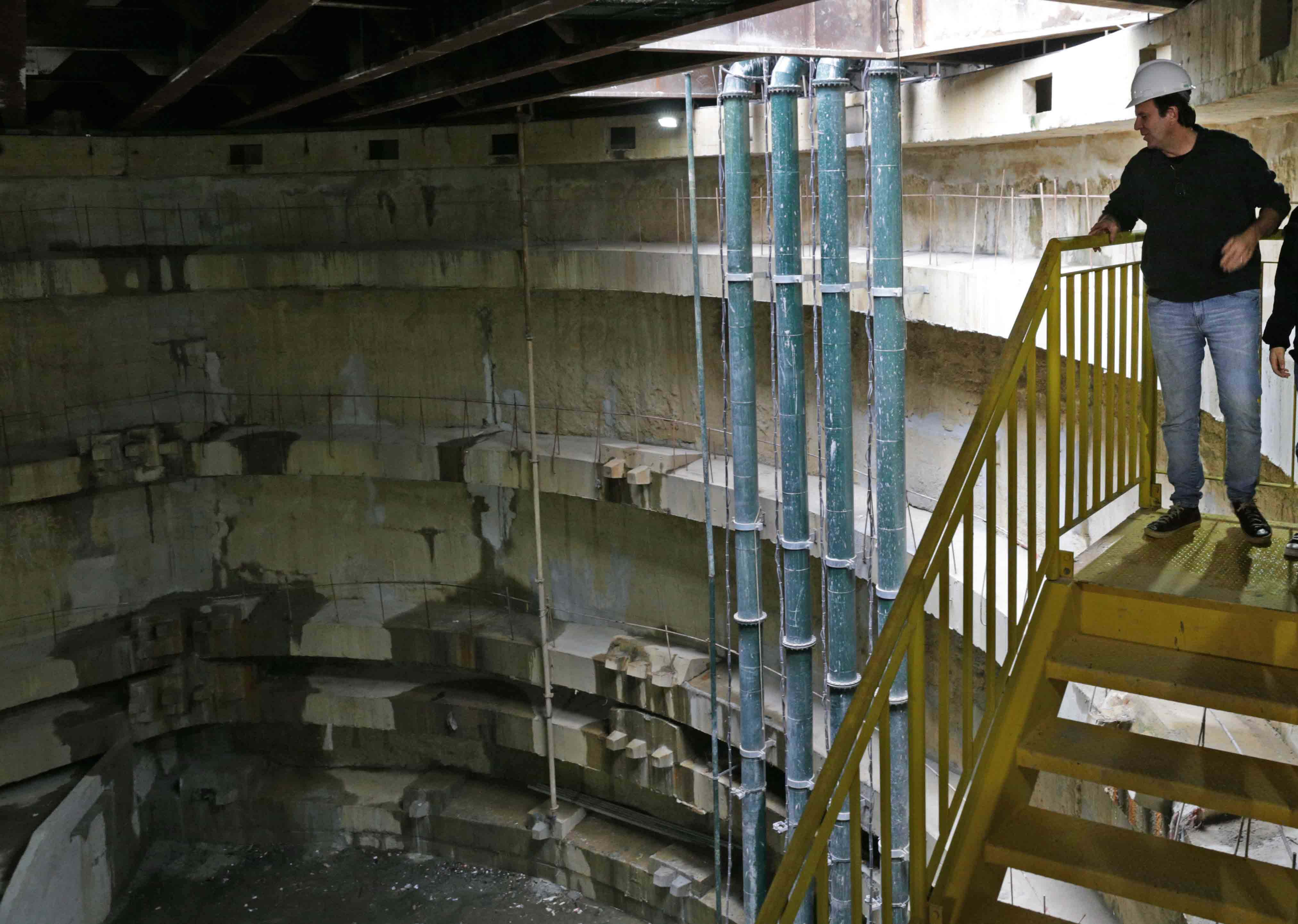 Reservatório de águas pluviais da Praça Varnhagem em 2016.